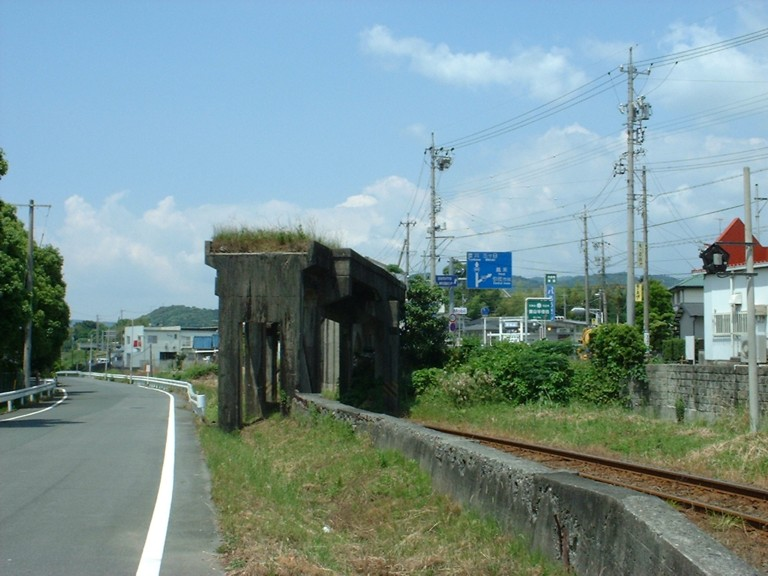 遠州鉄道奥山線 国鉄二俣線跨線橋跡 天竜浜名湖鉄道天竜浜名湖線 金指駅～気賀高校前駅間（遠鉄奥山線では金指駅～岡地駅間） 撮影当時は引佐郡引佐町